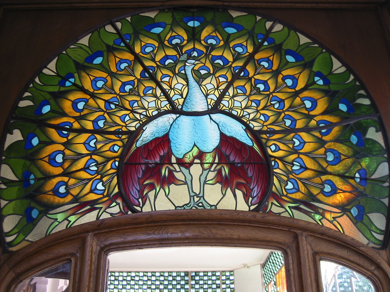 Le paon (1905), vitrail de Joseph Janin dans le jardin d'hiver de la villa Bergeret, Nancy, Lorraine, France